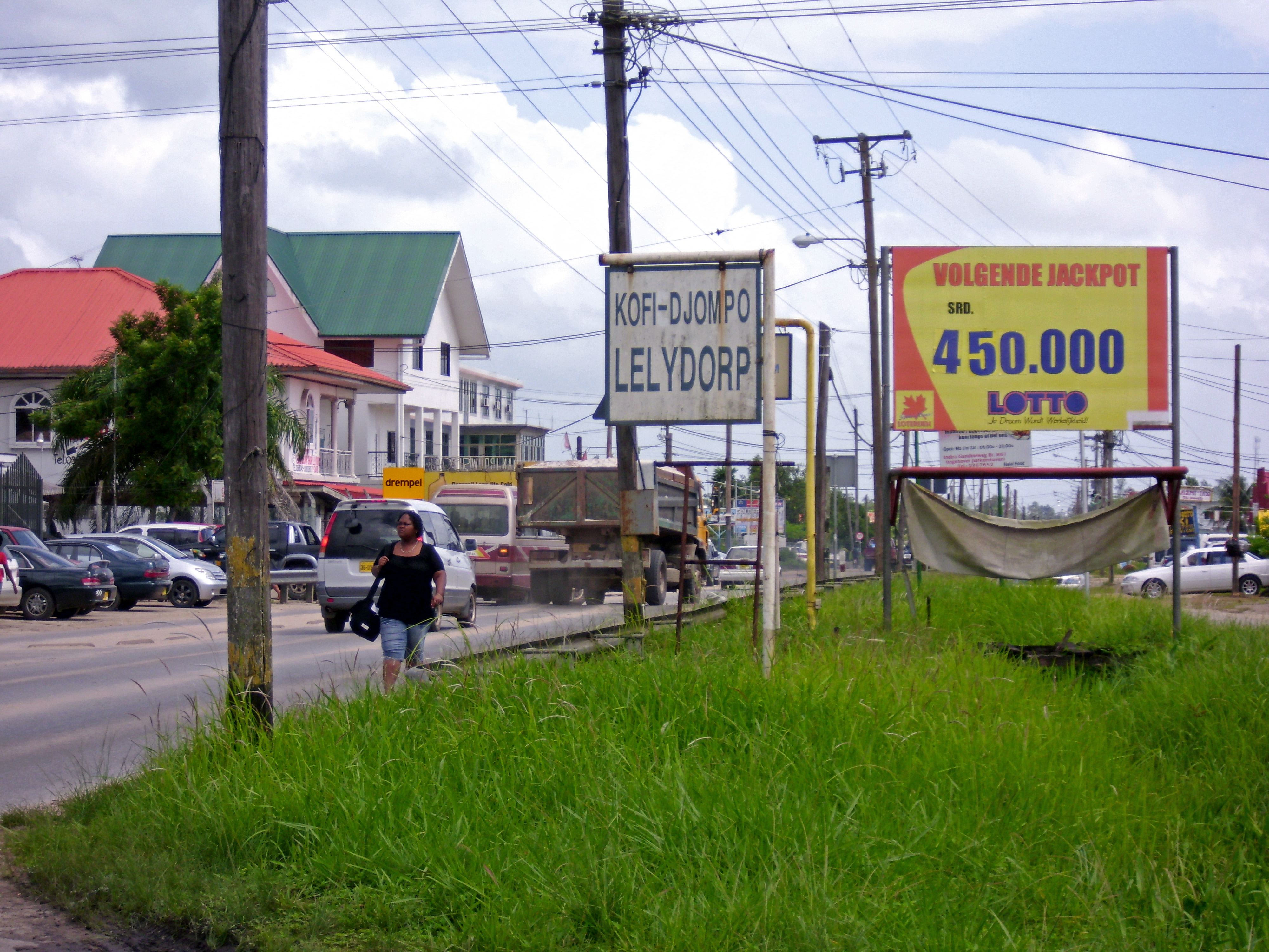 Lelydorp, Ortsschild